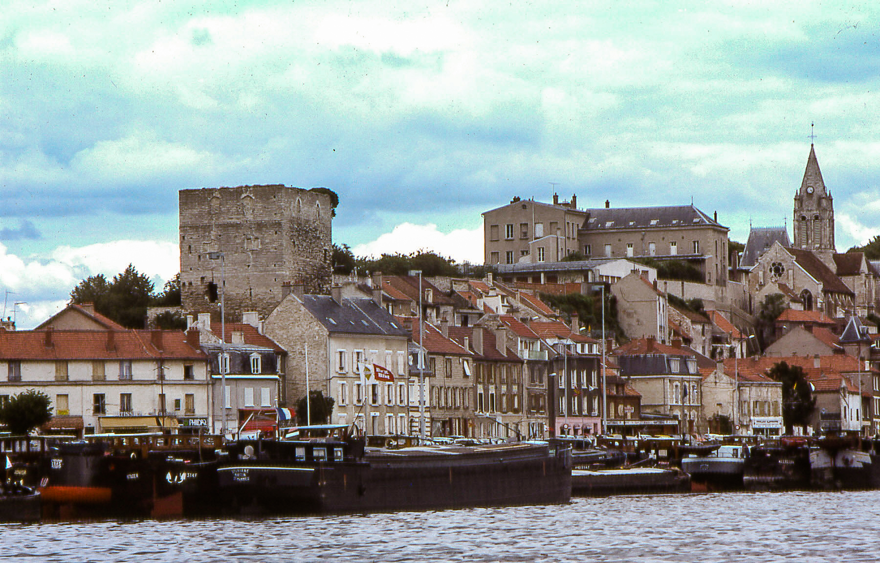 Le centre historique de Conflans-Sainte-Honorine.Yvelines.France.La Tour Monjoie est un donjon du XIe siècle, à sa droite l'église Saint-Maclou d'époque romane et gothique.Au premier plan la Seine.